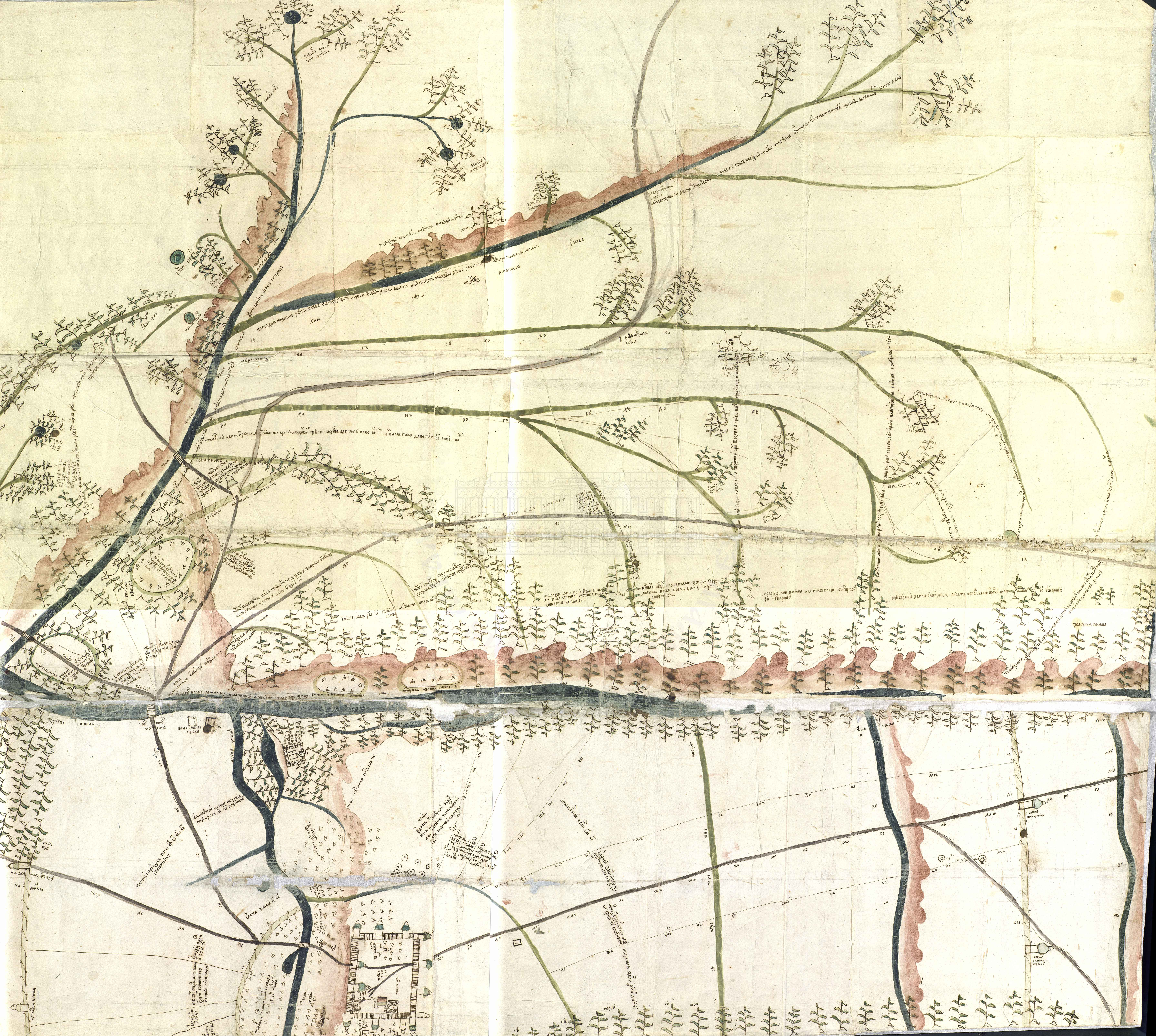 Данная карта занесена в коллекцию "Уникальных документов Архивного Фонда Российской Федерации". Ф. 1209. Оп. 77. Ед. хр. 34699. РГАДА. Документ зафиксировал исторический ландшафт и коммуникации в окрестностях города Валуйки, существовавшие в эпоху позднего Средневековья. Помимо собственно города, на чертеже особо отмечены следующие слободы: Покровская черкасская, Казачья, Ямская, Атаманских ездоков, Конных стрельцов; а также Успенский монастырь, часовня, Большая Московская, Посольская, Оскольская, Белгородская дороги, реки Оскол, Мокрая и Сухая Козинки, Волуи, Первый и Второй Созон, лесные массивы и другие природные объекты, земельные угодья с обозначением межевых граней. Историческая справка: Выполненный в красках чертеж был создан в Поместном приказе в 1687 году в ходе разбирательства спорного дела валуйских стрельцов и пушкарей с ямщиками о поместных дачах за рекой Осколом.